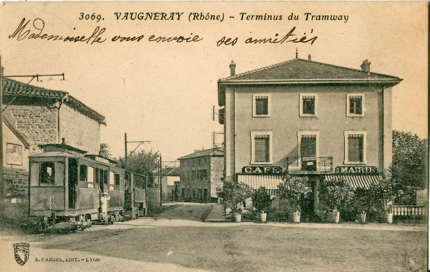 Carte postale ancienne éditée par S. Farges, édit. à Lyon, n°3069VAUGNERAY - Terminus du TramwayIl s'agit d'une rame du Train de Vaugneray exploitée par le Fourvière Ouest-Lyonnais (FOL)